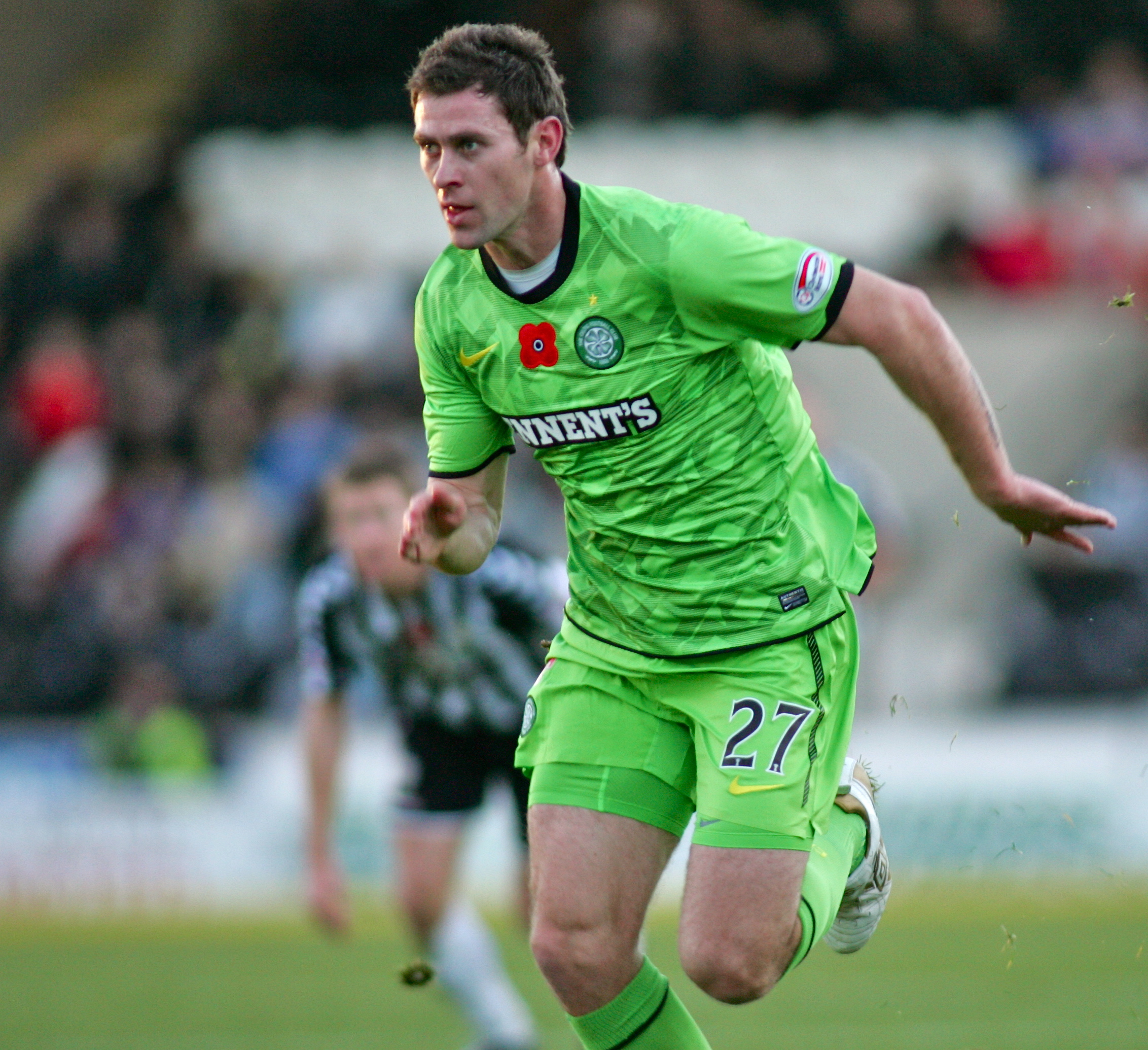 HI7Y0328